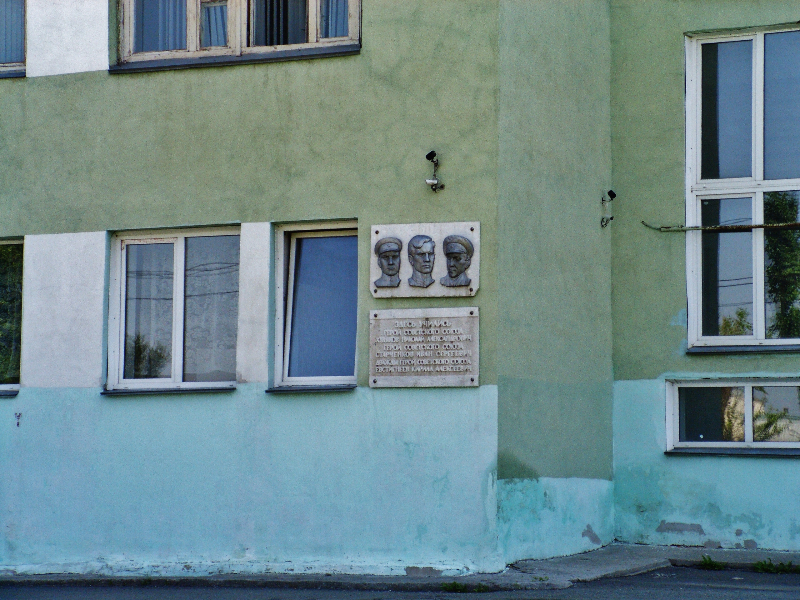 Traktorozavodskiy rayon, Chelyabinsk, Chelyabinskaya oblast', Russia